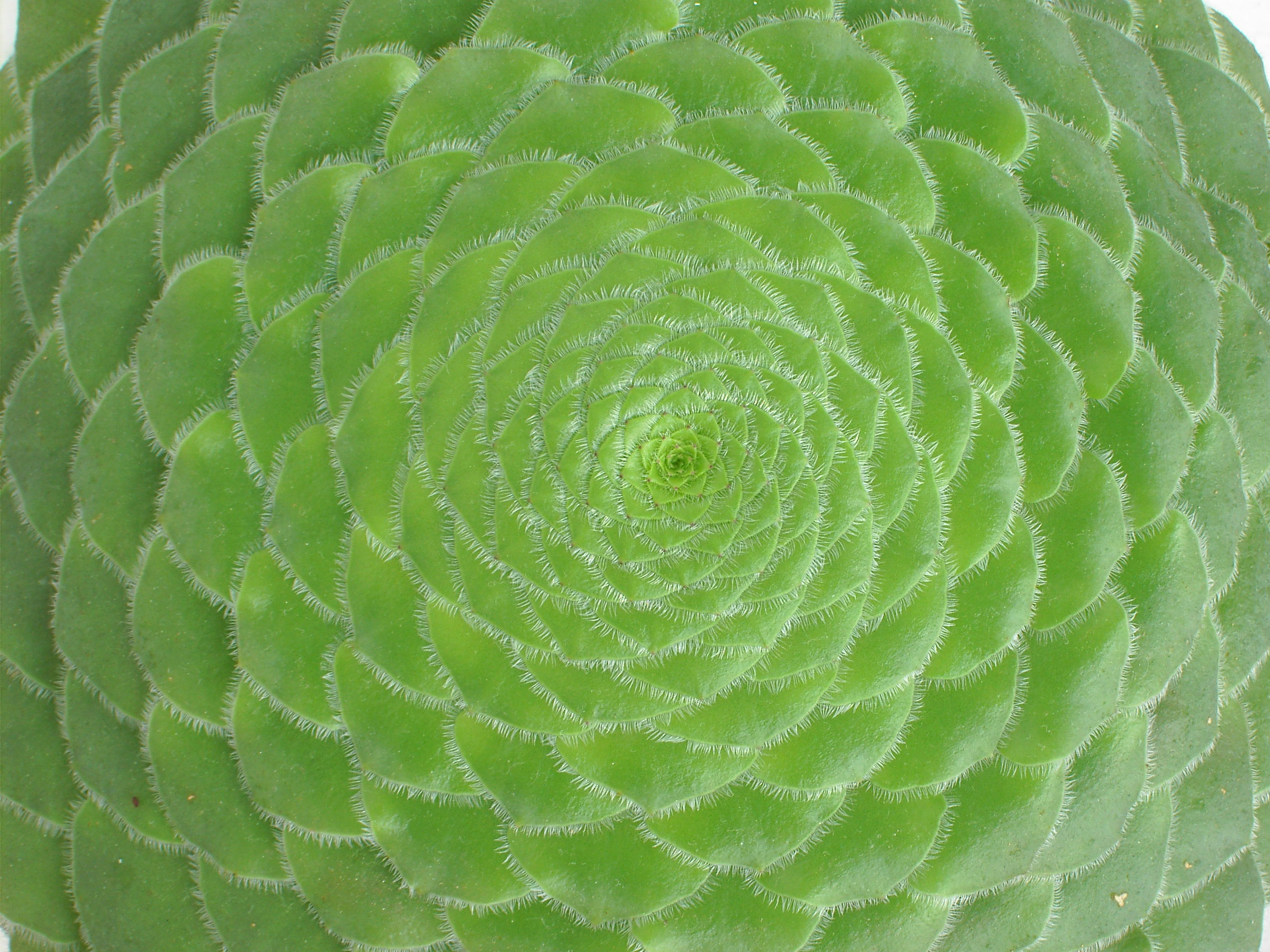 Aeonium tabuliforme